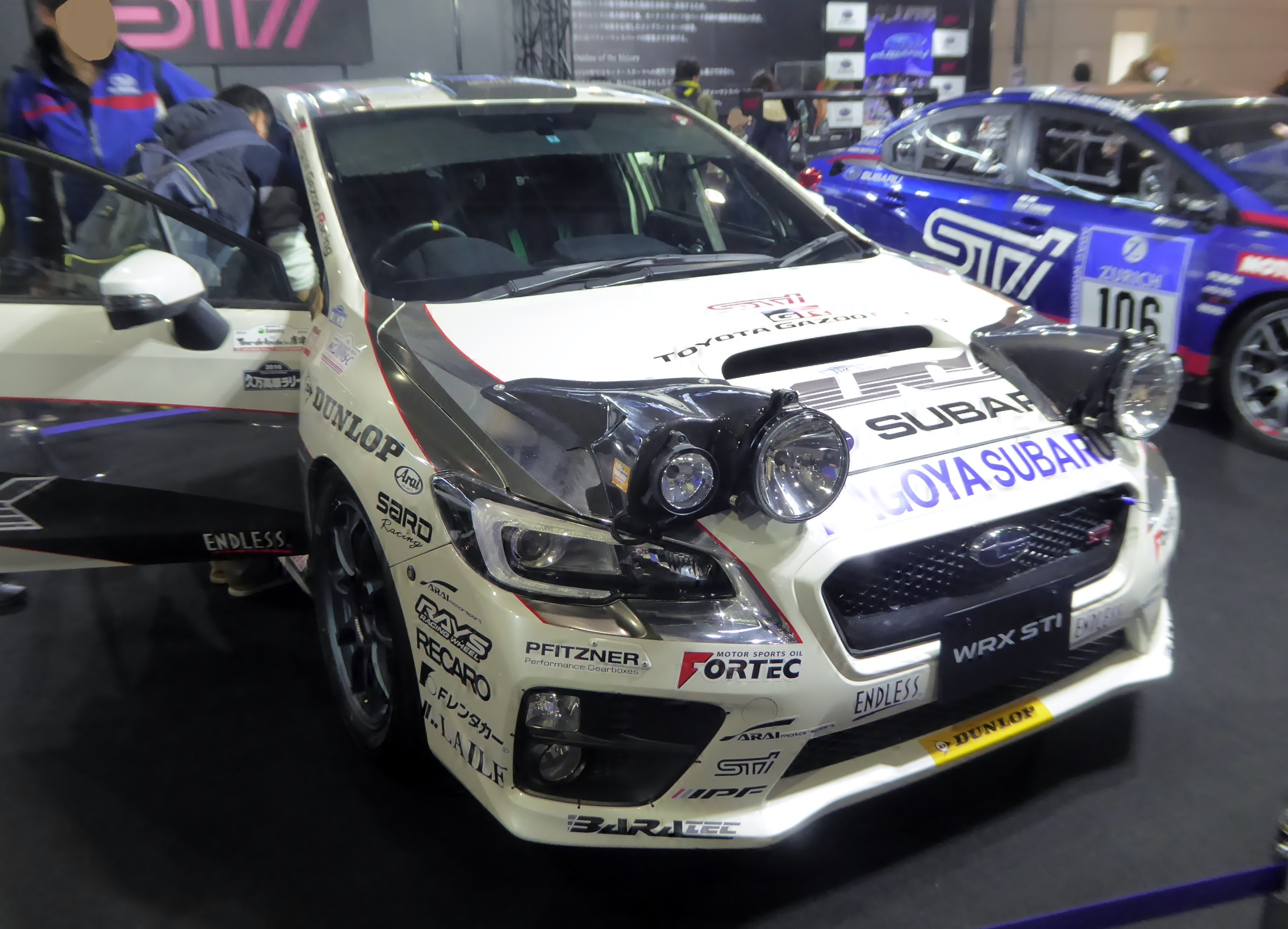 大阪オートメッセ2017に於いてスバル・WRX STI全日本ラリー選手権2016年度優勝車両を撮影。